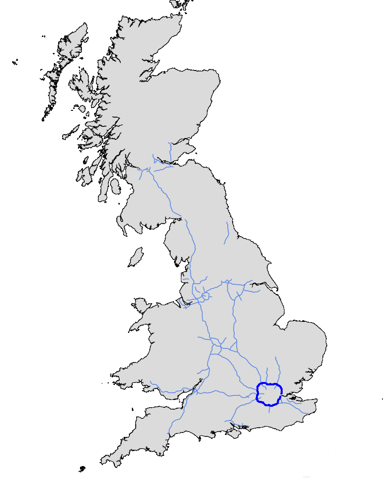 M25